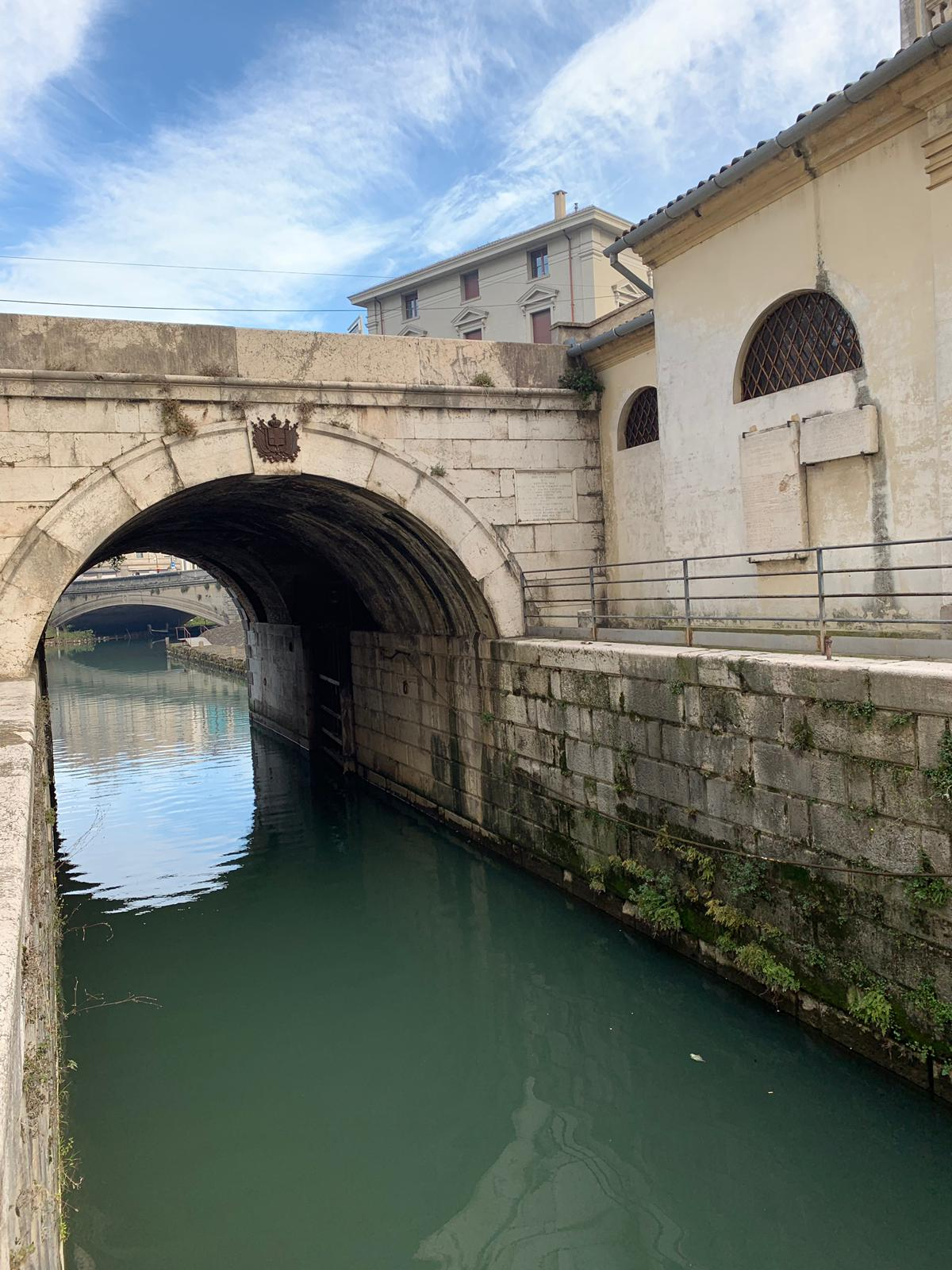 Ponte di via Giotto o dei Contarini, 2019